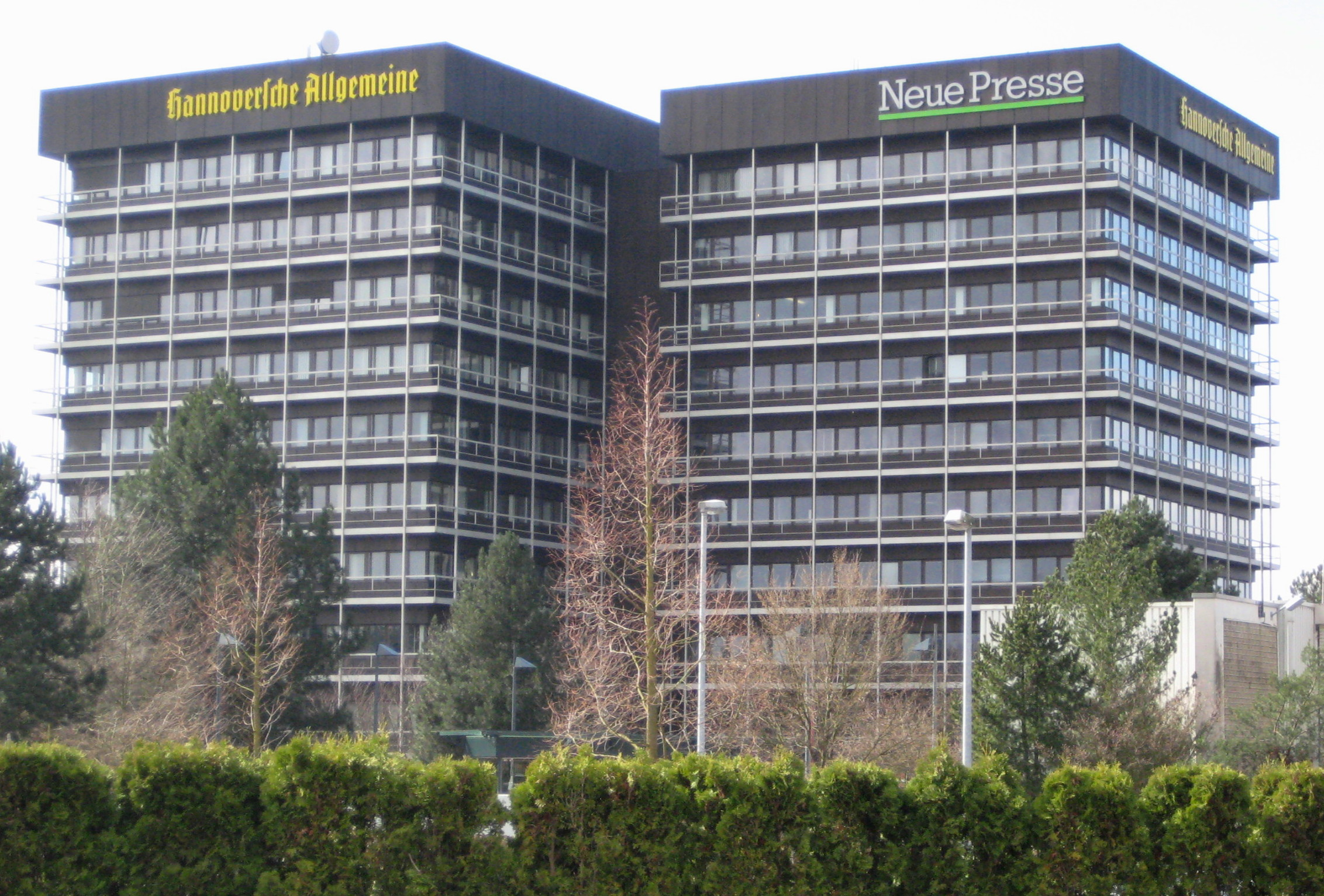 Verlagsgebäude von Madsack in Hannover, Sitz auch der Redaktionen von HAZ und NP